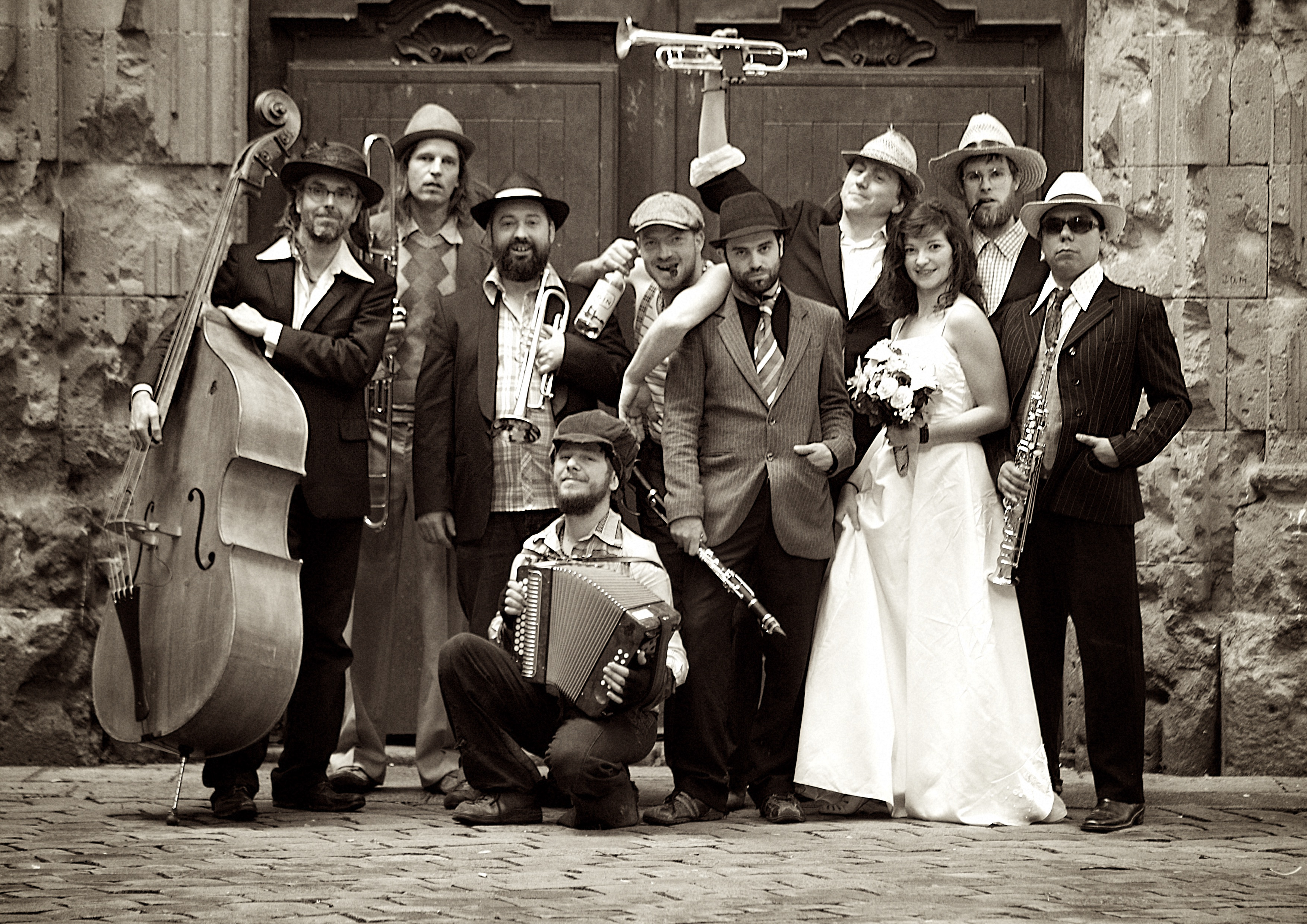 Groepsfoto Amourouse